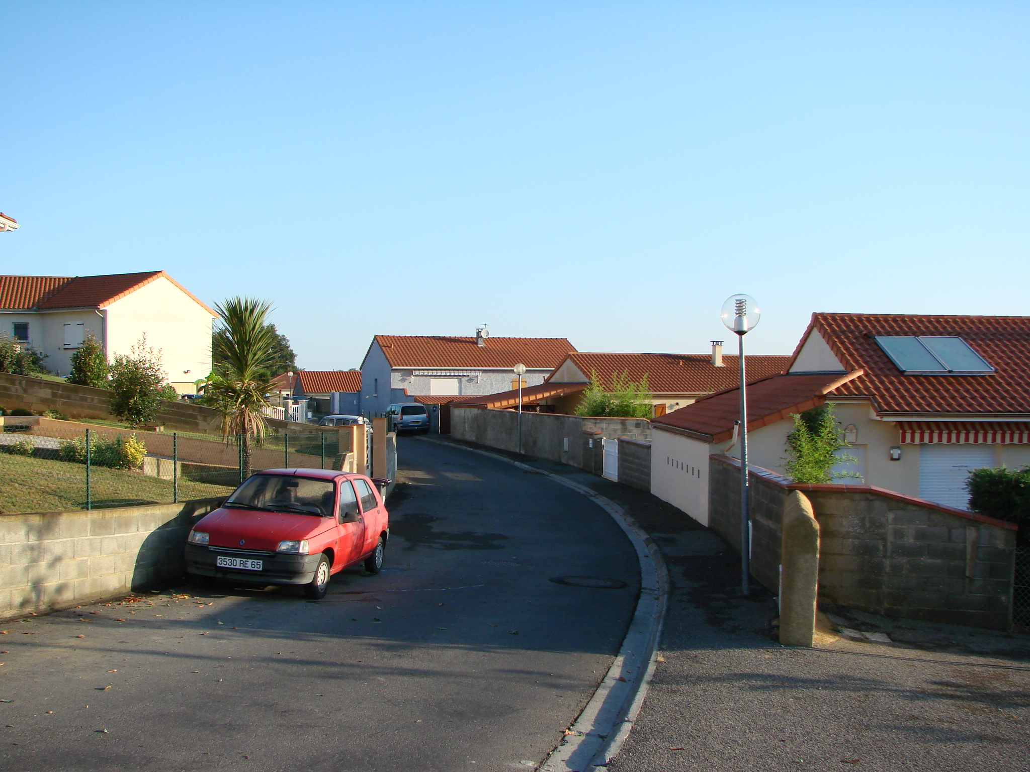 Vue du village de Dours dans les Hautes-Pyrénées (France) : Lotissement de nouvelles maisons, quartier résidentiel (vue depuis l'église)